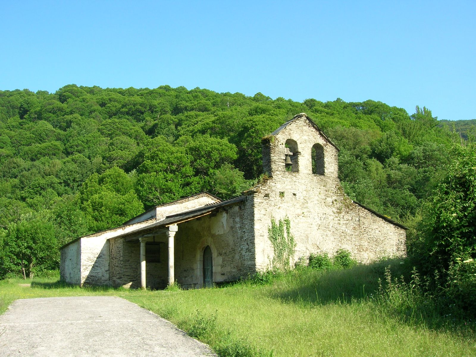 Pequeña ermida que se acha preto de Esperante (Folgoso do Courel).